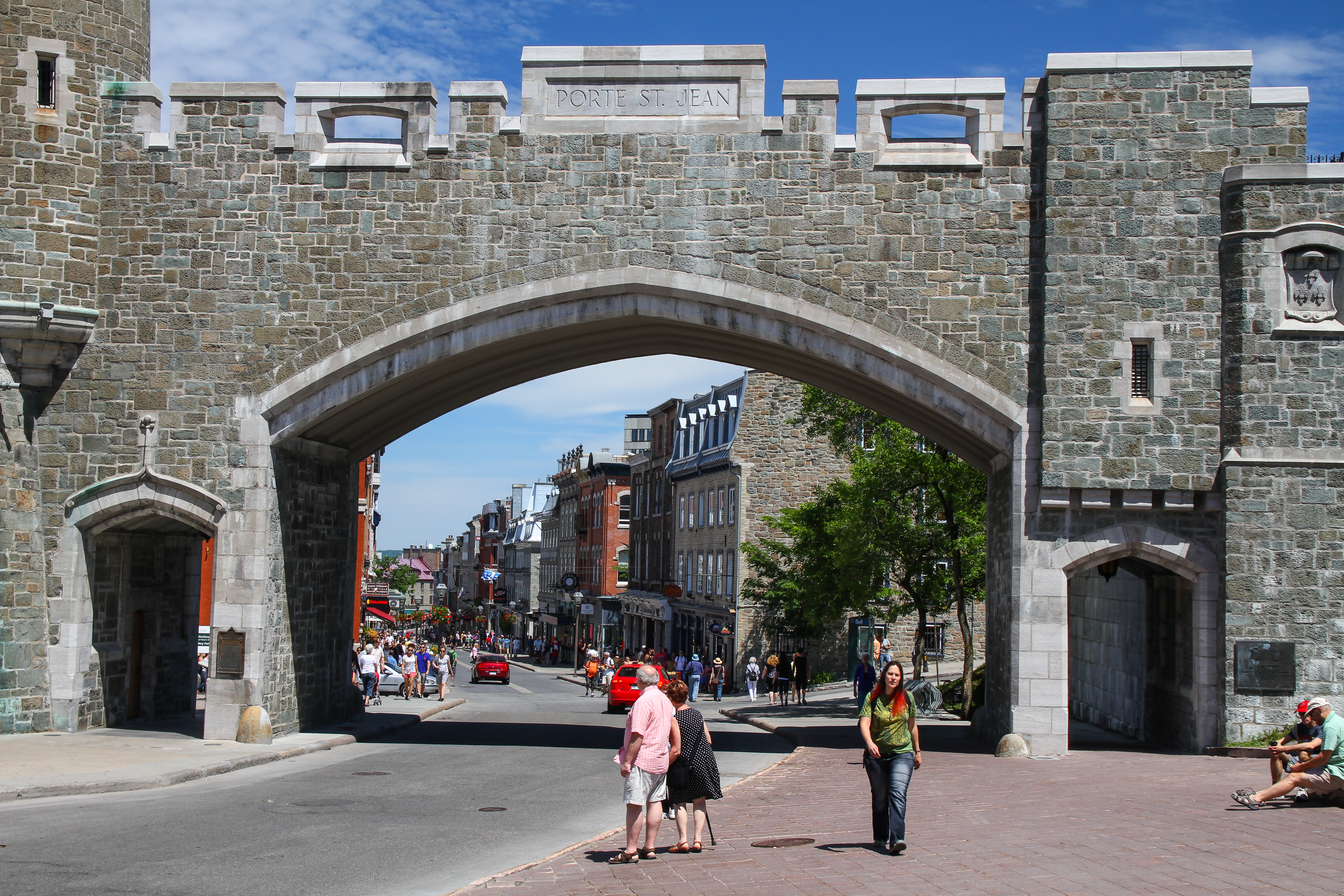 Porte Sainte-Jean et rue Saint-Jean depuis place d'Youville, Québec